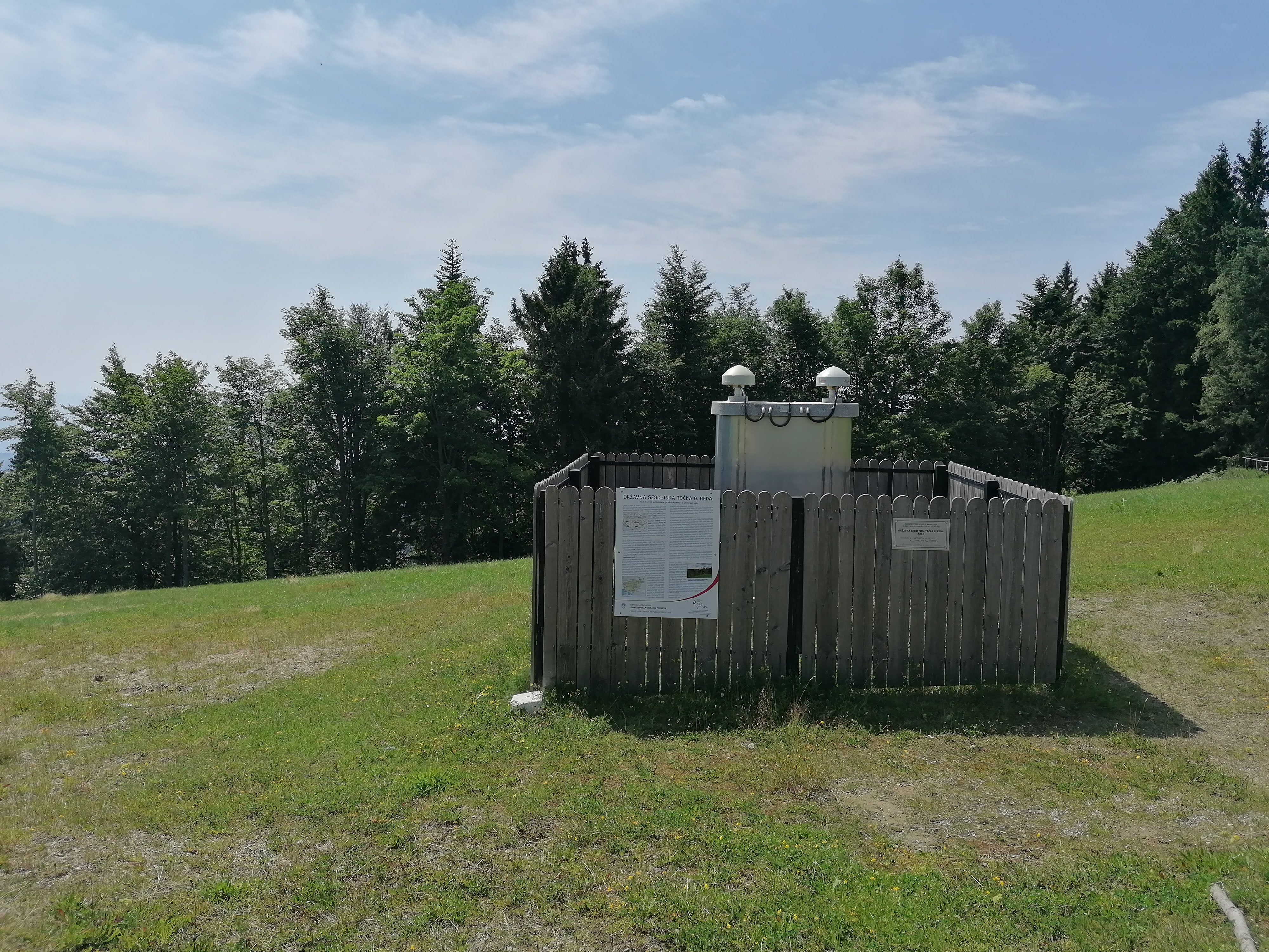 Areh - točka mreže 0. reda